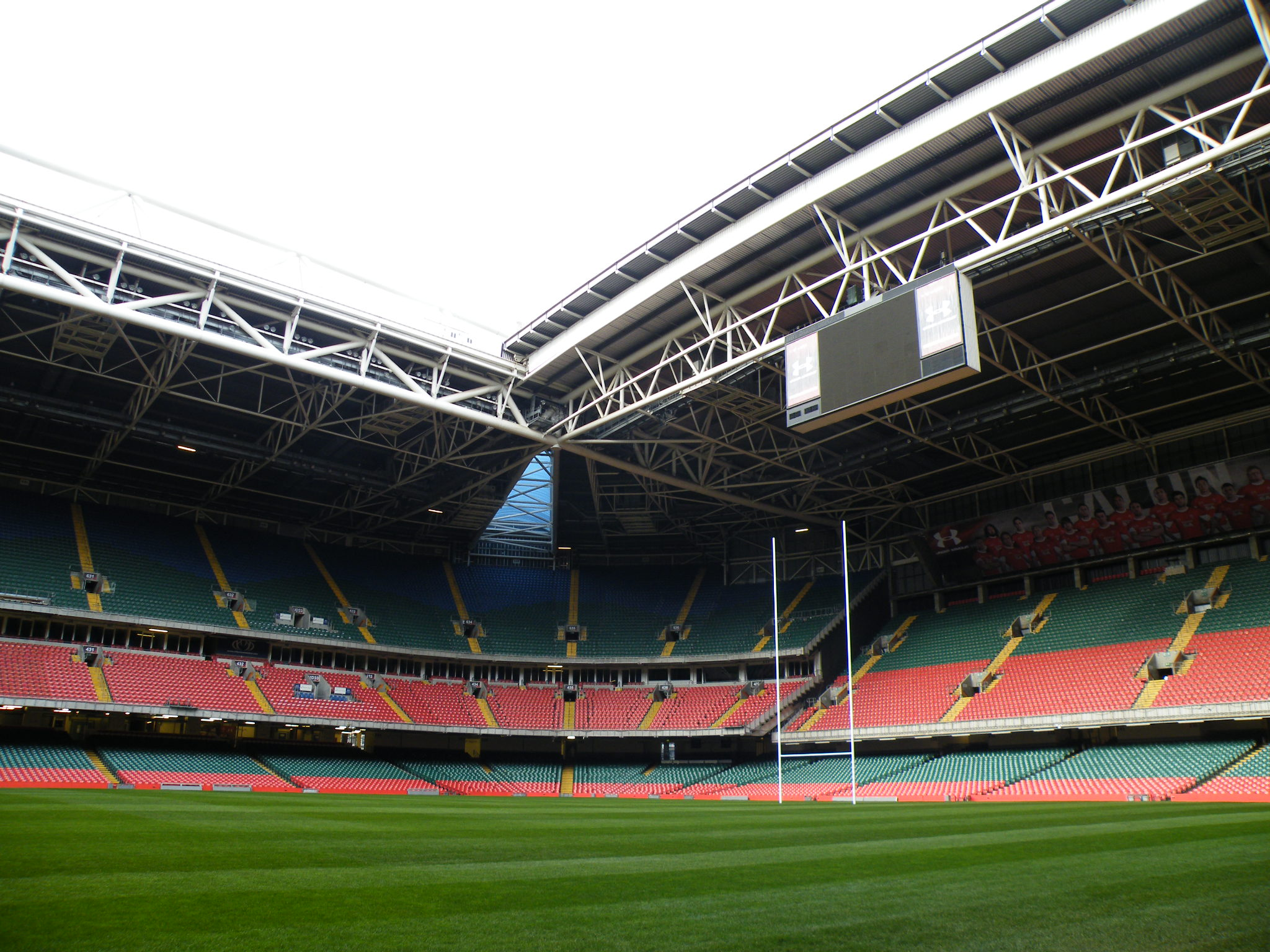 rhan o'r cae